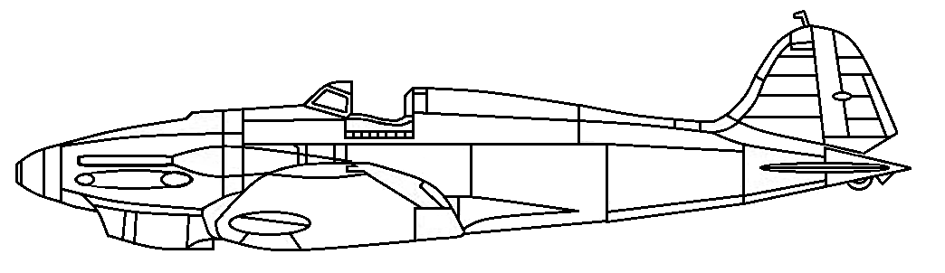 Seitenprofil Heinkel He 112 V5